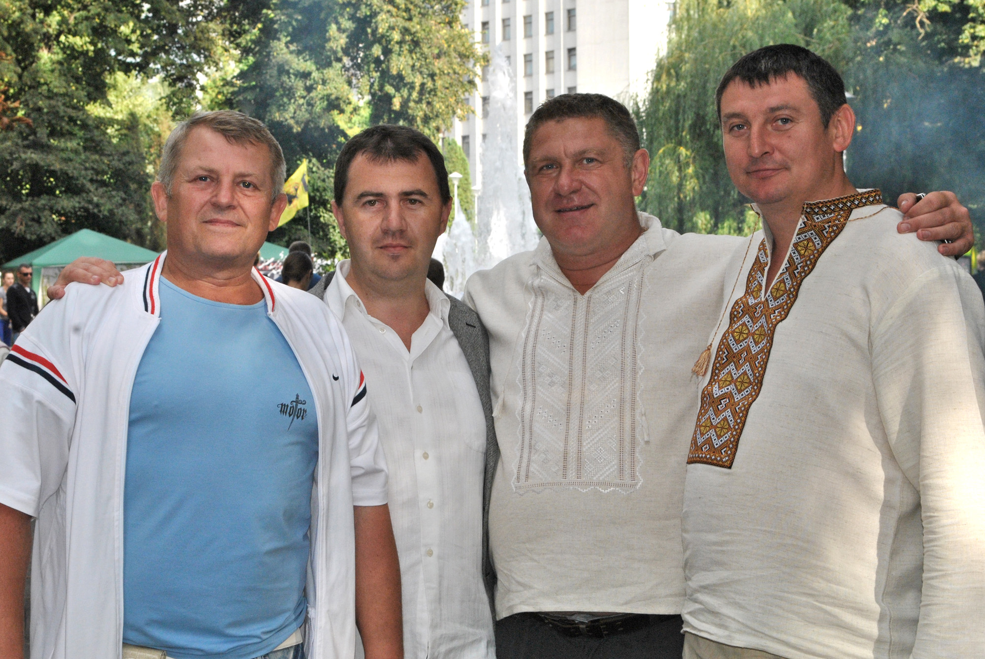 Тернопільські громадсько-політичні діячі: крайні справа — Роман Білінський, Віктор Уніят.